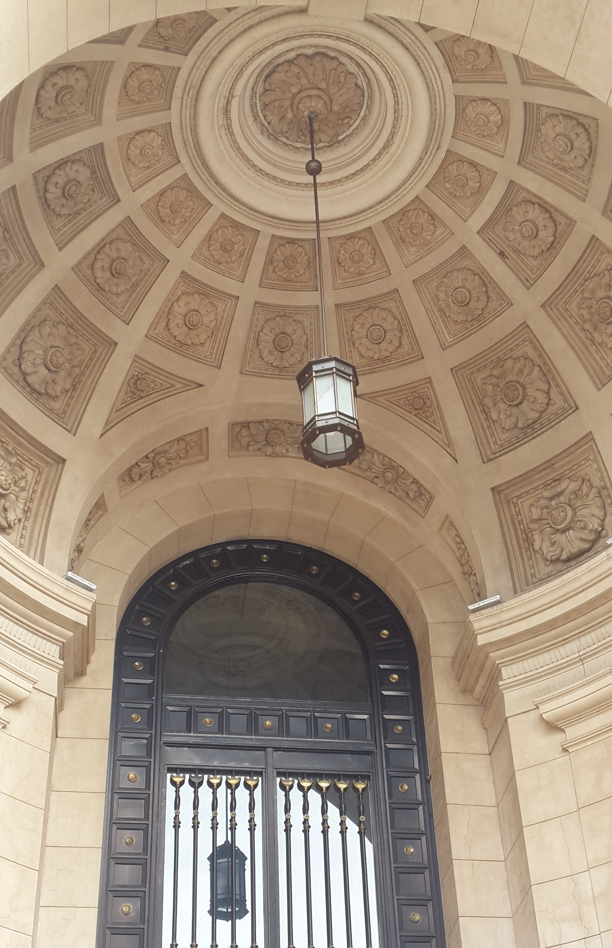 Detalle cúpula de ingreso